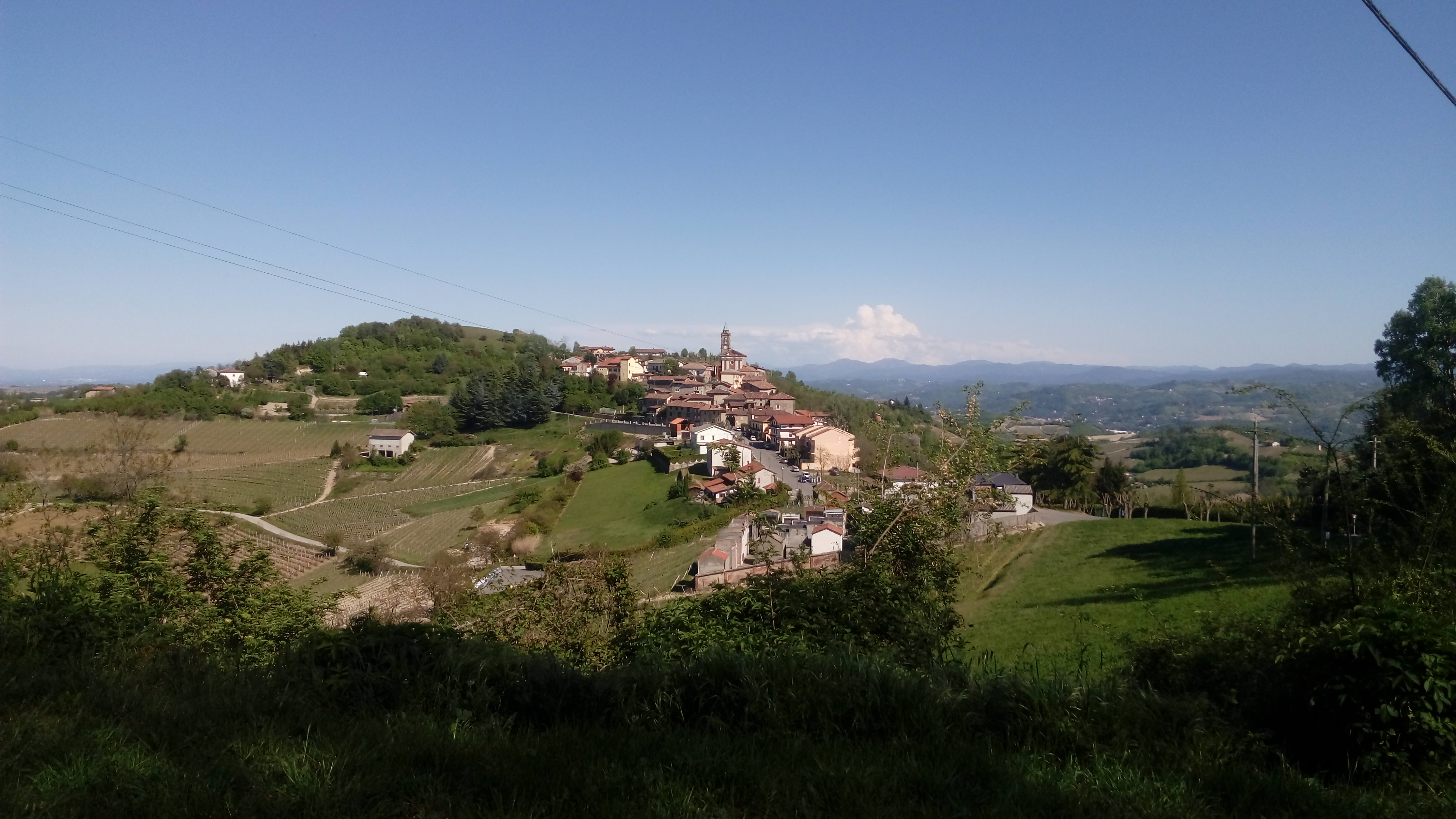 Comune di Montabone (AL), Italia